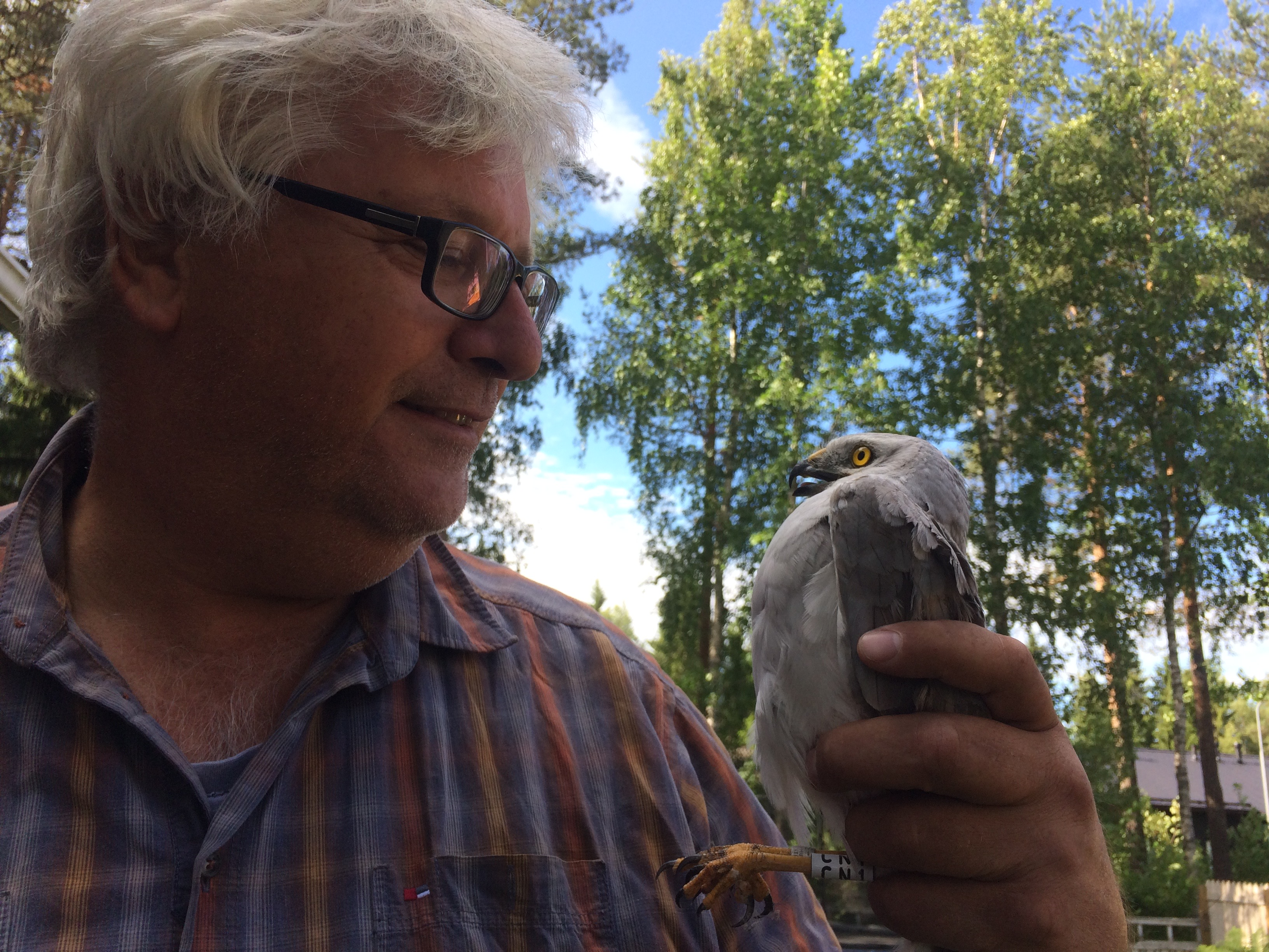 Ben Koks met steppekiekendief, 2019.